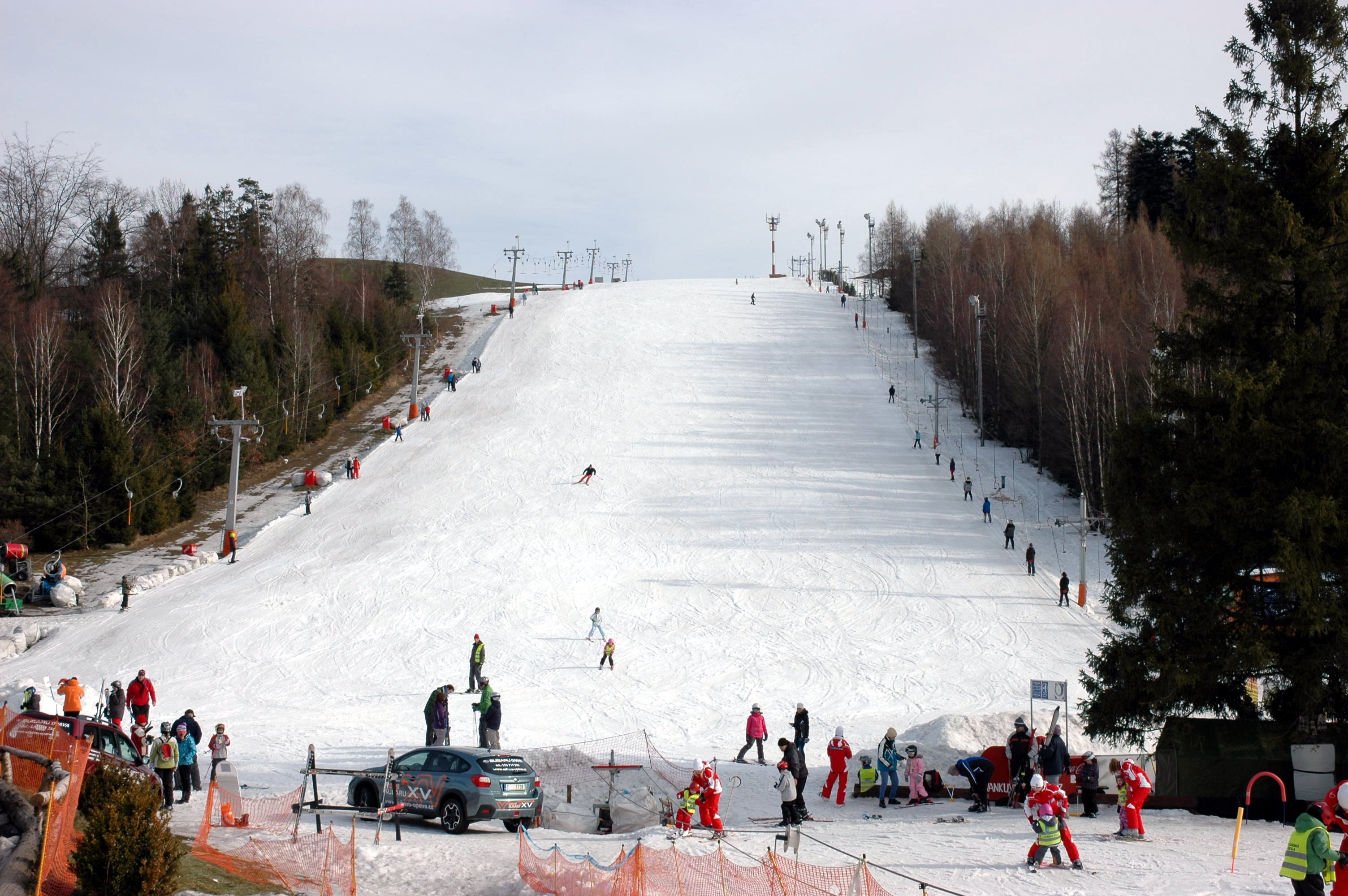 Česky: Lyžařský areál Vaňkův kopec, Horní Lhota (okres Ostrava-město)